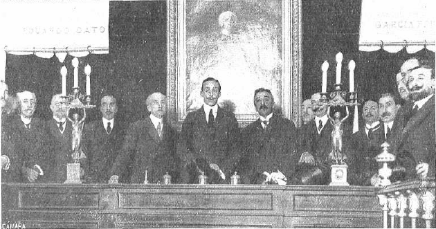 Fotografía que muestra al rey de España Alfonso XIII, flanqueado por el presidente del Consejo de Ministros Eduardo Dato y Niceto Alcalá-Zamora, y acompañado por otras personalidades, durante el acto de reparto de premios a los alumnos del Centro Instructivo del Obrero celebrado en la sede de la Real Academia de Jurisprudencia.